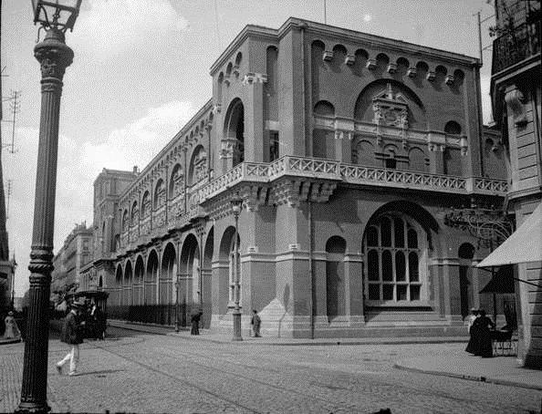 Musée des Augustins, au carrefour des rues de Metz et d'Alsace-Lorraine. Juillet 1905. Vue du bâtiment faisant angle prise au carrefour des deux voies. Aile Darcy du musée ; lampadaire.